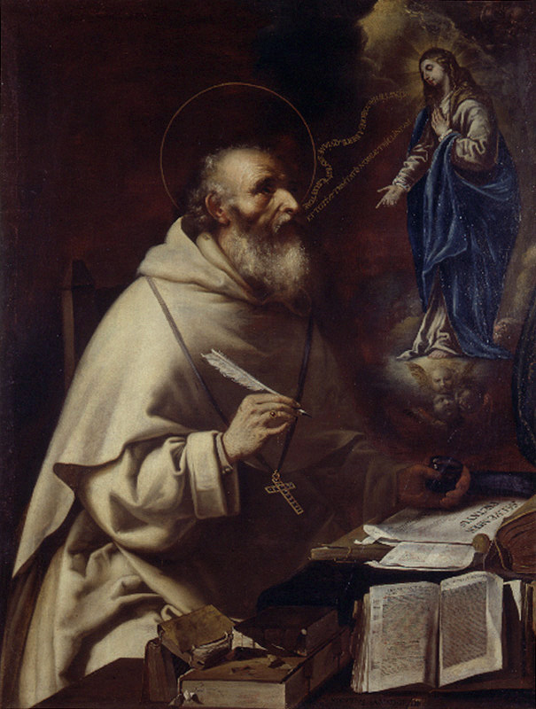 La obra representa a la Virgen María apareciéndose a San Alberto Magno.